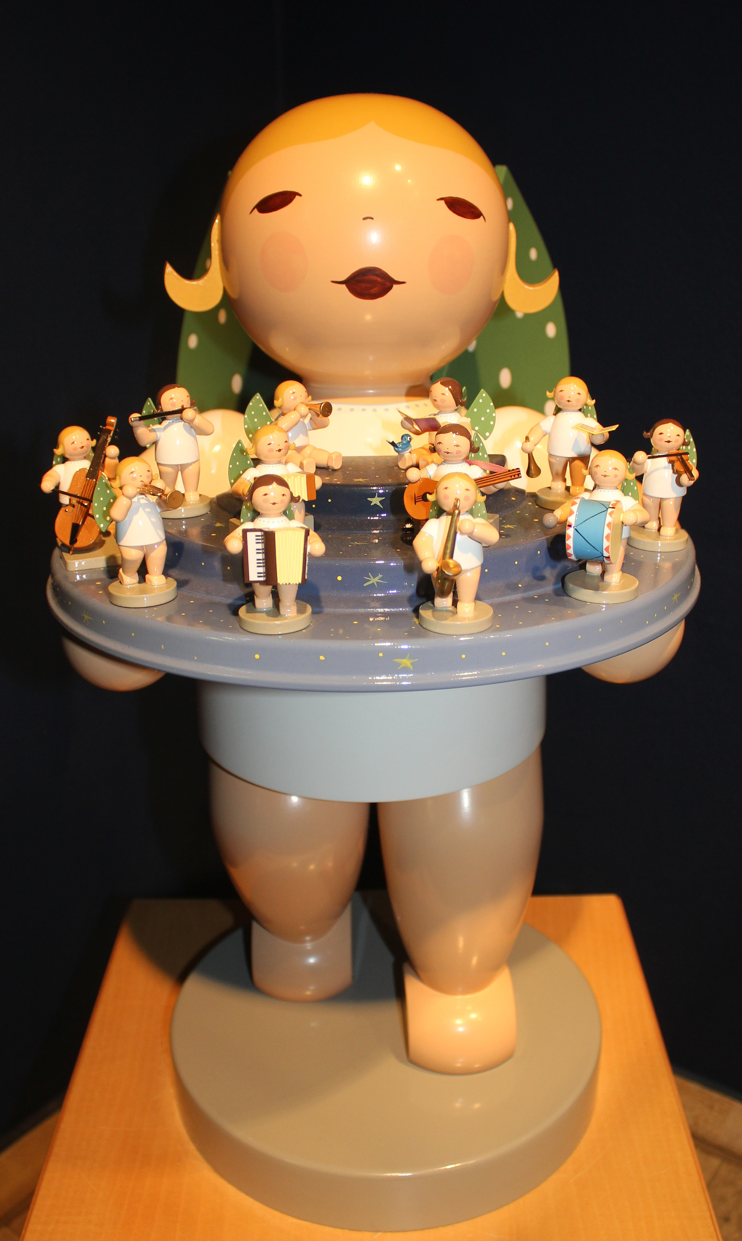 Holzfiguren von Wendt & Kühn in Seiffen. Erzgebirgskreis. Sachsen.